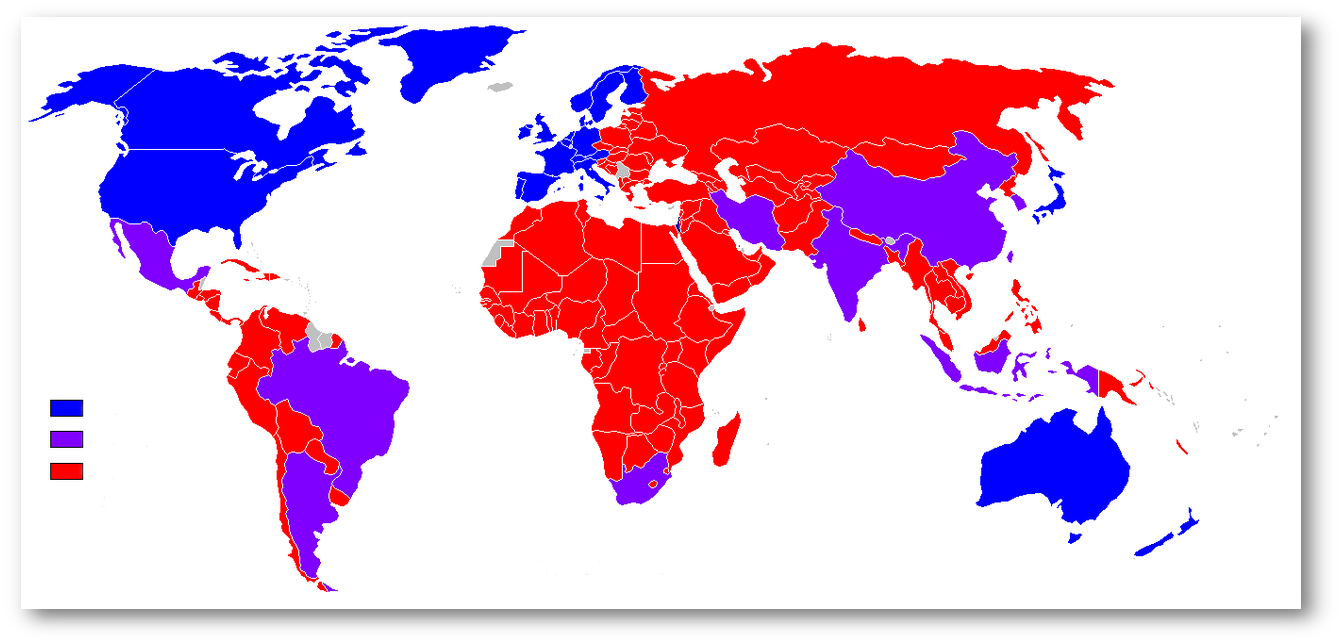 Мир системный анализ И. Валлерстайна.